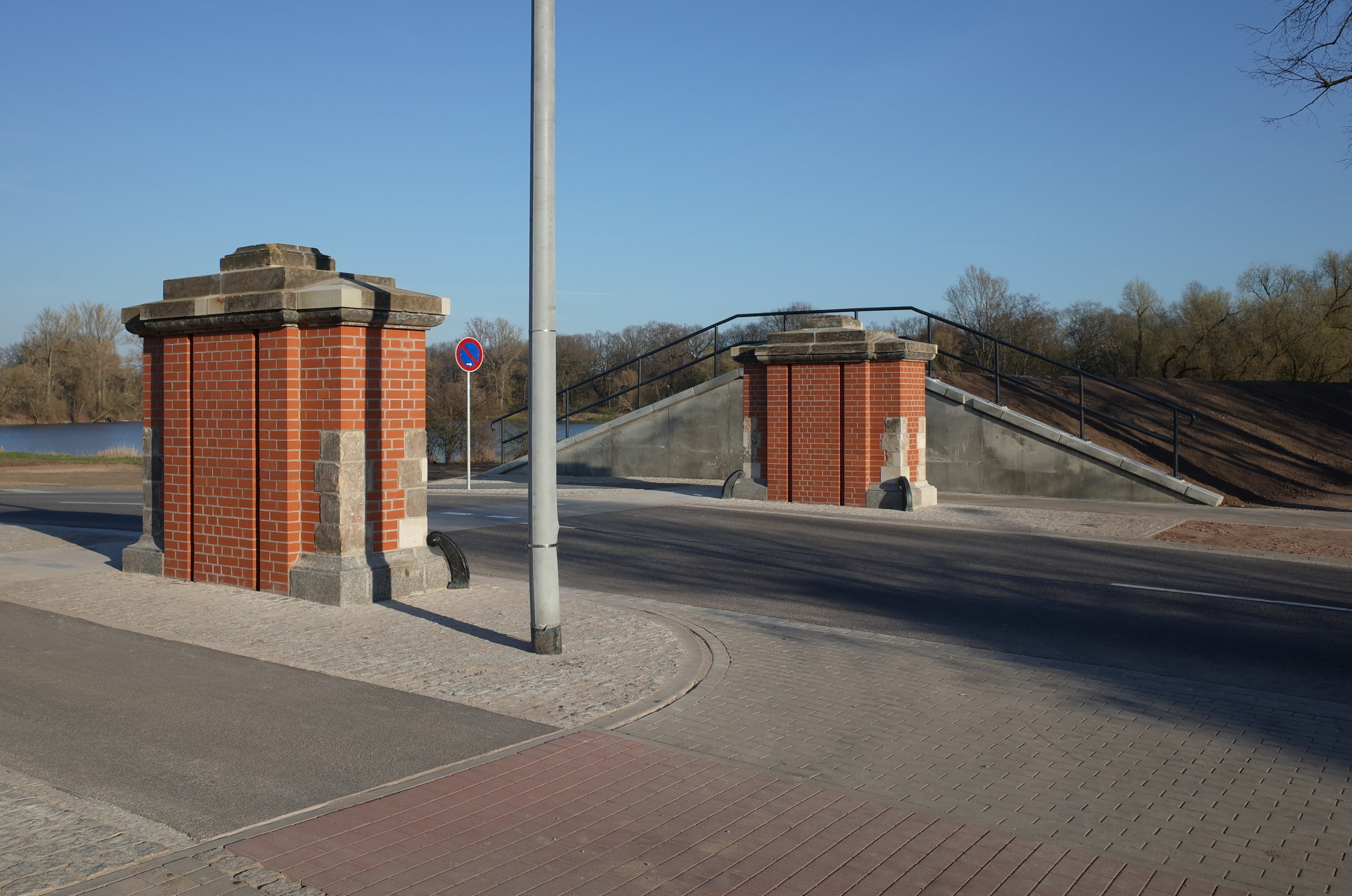 Dessau-Roßlau, Deichdurchlass in der Wasserstadt. 2016/2017 wurde die Hochwasserschutzanlage den heutigen Anforderungen angepasst. Die alte Anlage wurde Restauriert und ist heute ein Schmuckelement ohne Funktion beim Hochwasserschutz.